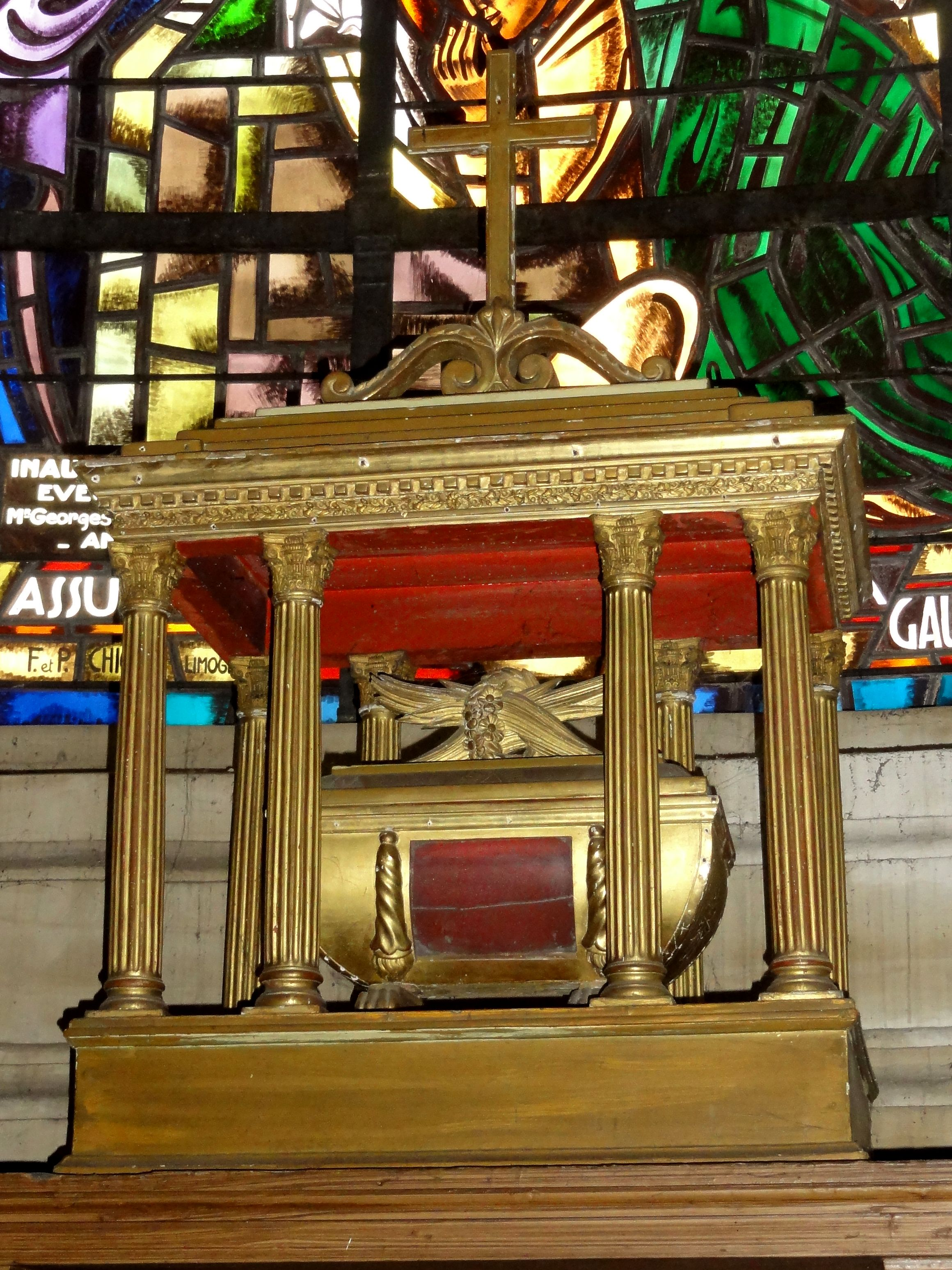 Châsse à reliques.